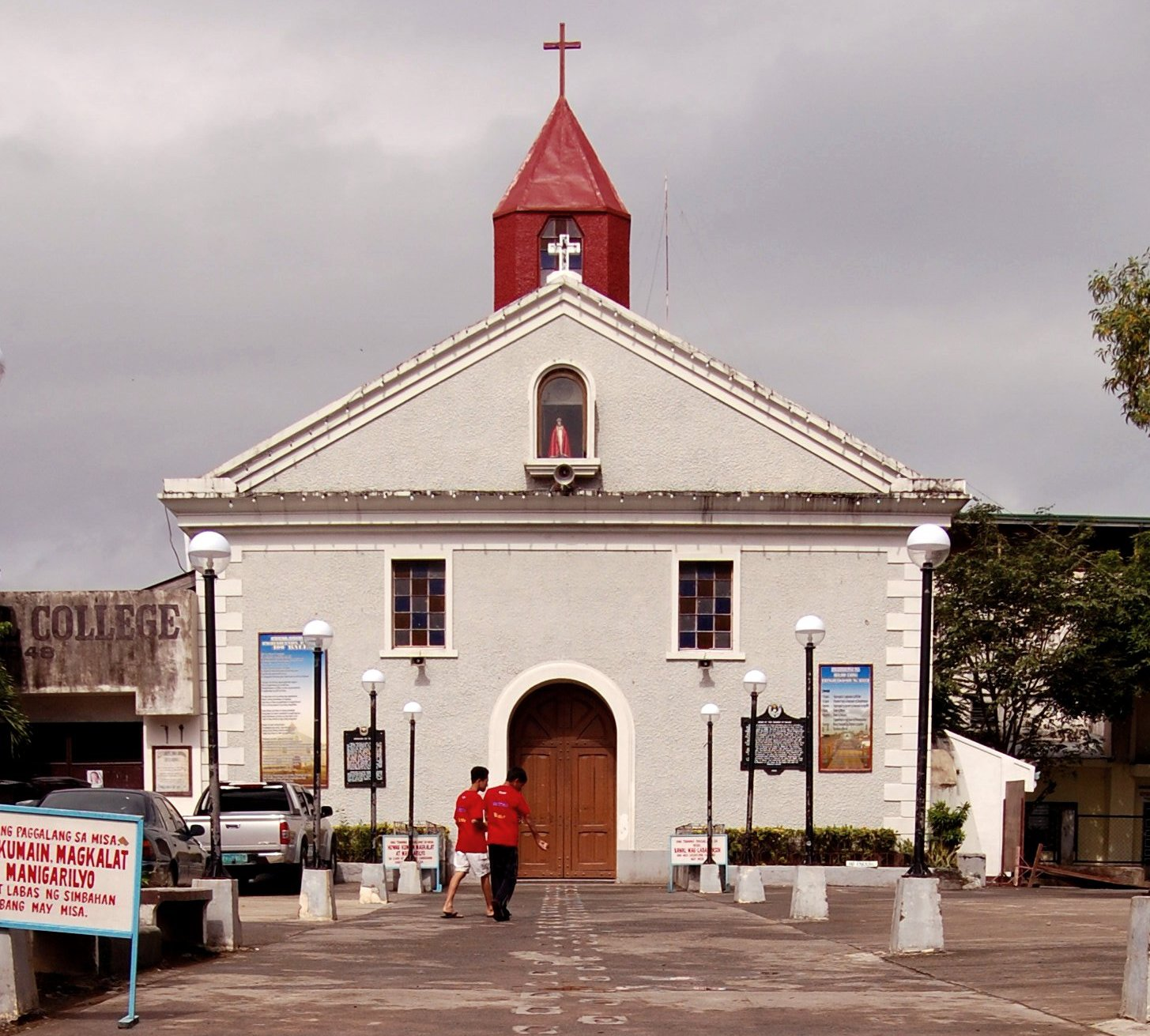 Iglesia de San Luis de Tolosa de Baler